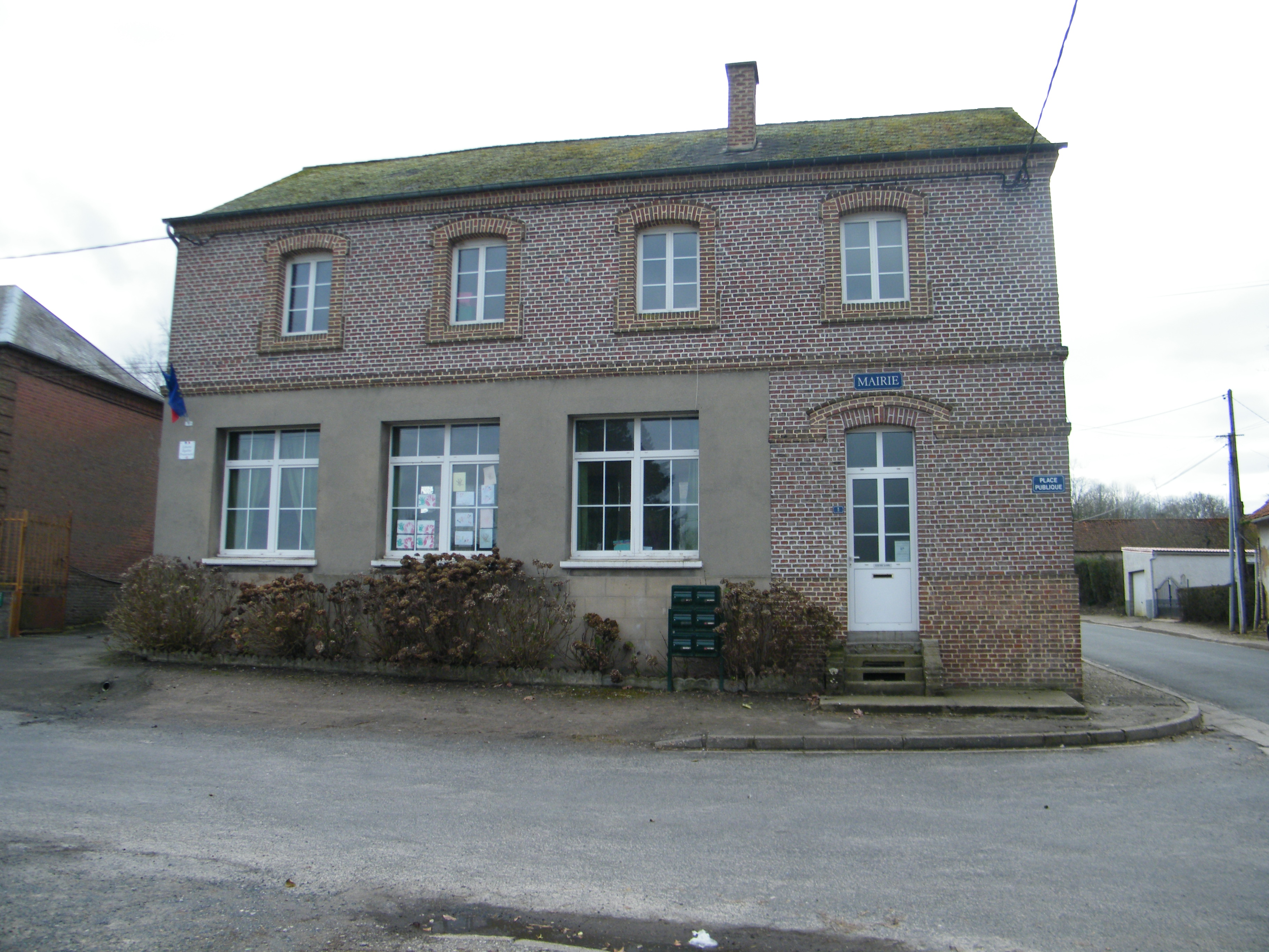 Mairie-école